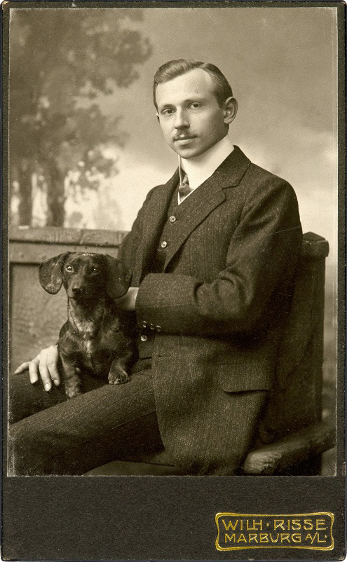 Georg Heinrich Mylius im Alter von 24 Jahren während seiner Studienzeit in Marburg.